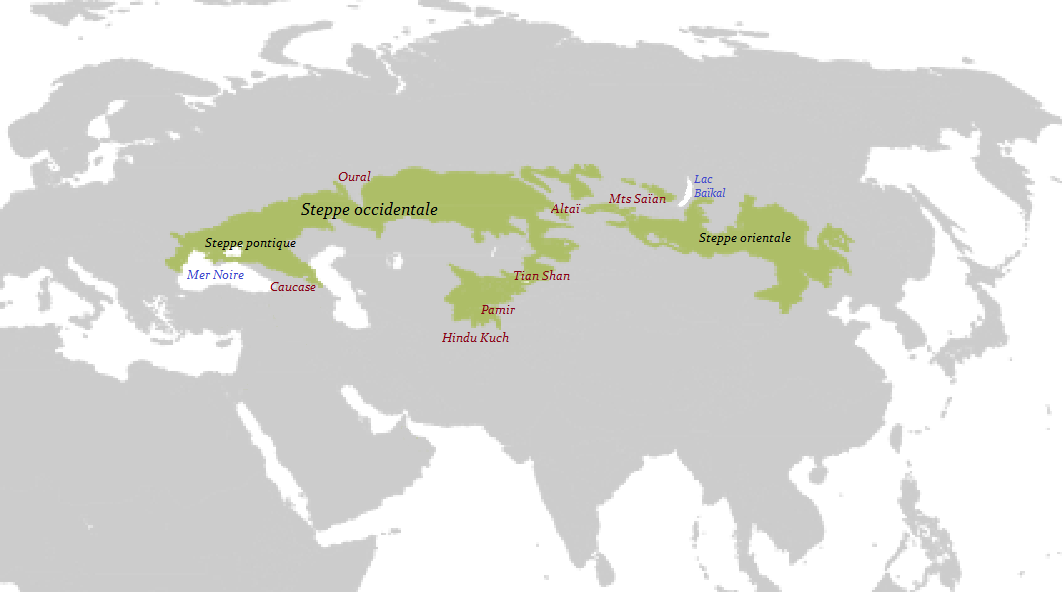 Carte de localisation de la steppe eurasienne